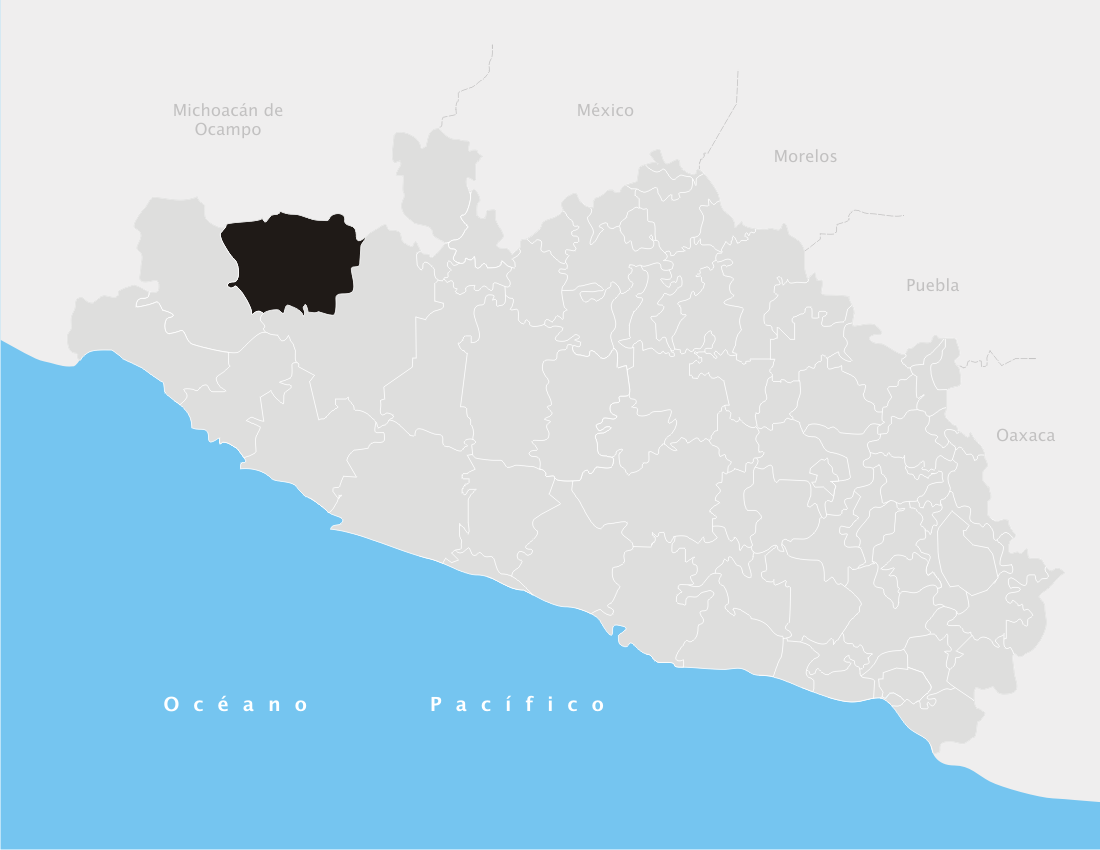 Zirándaro en el estado de Guerrero (México)